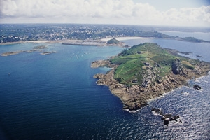 Île Milliau, Trébeurden. Vue depuis le N-O. Port de Trébeurden légèrement sur la gauche derrière l'île. Plage de Tresmeur à droite du port, et encore à droite la pointe de Bihit. A gauche du port, la plage de Porz Termen avec en face d'elle le rocher de Radénec.